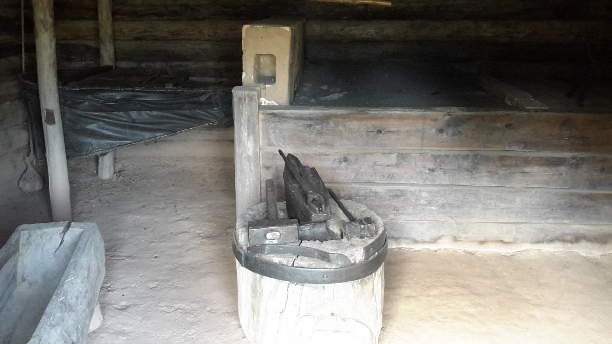 Строчыца. БДМНАБ. Кузня з в. Клочкава